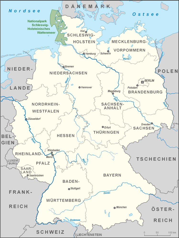 Karte des Nationalparks Schleswig-Holsteinisches Wattenmeer in Deutschland